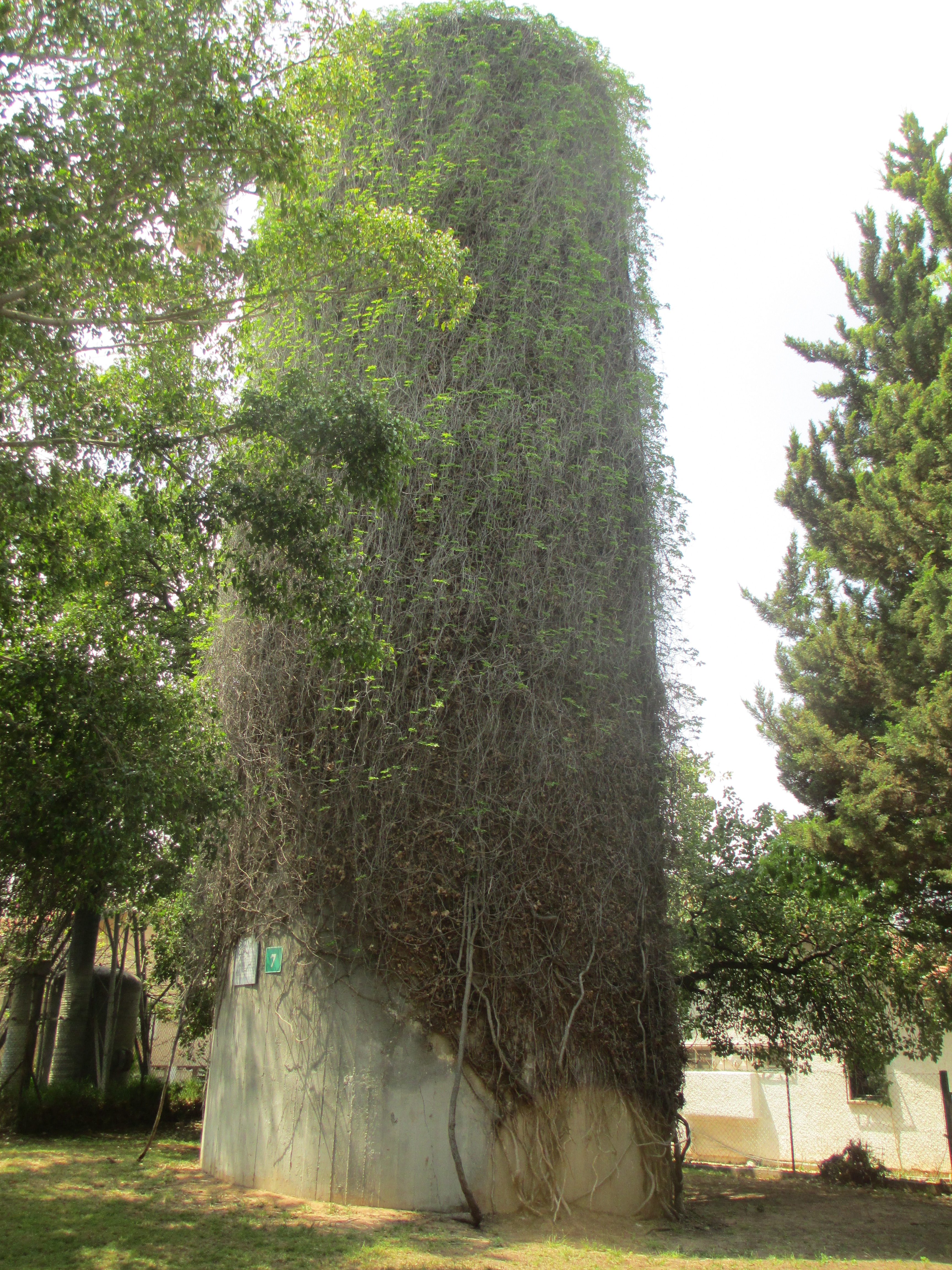 מגדל המים הישן בקריית אונו